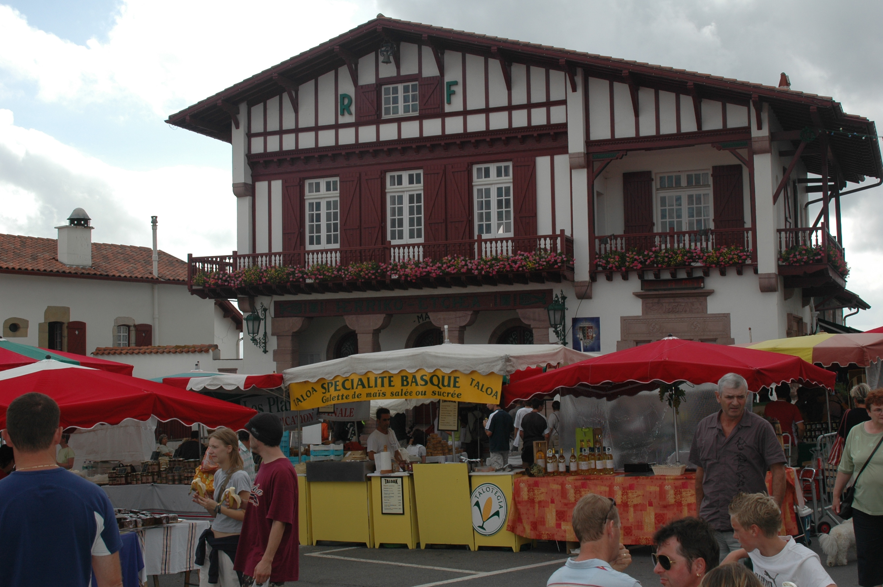 Bidart, le marché, devant l'hôtel de ville. Photo prise le 01/08/06 par Harrieta171